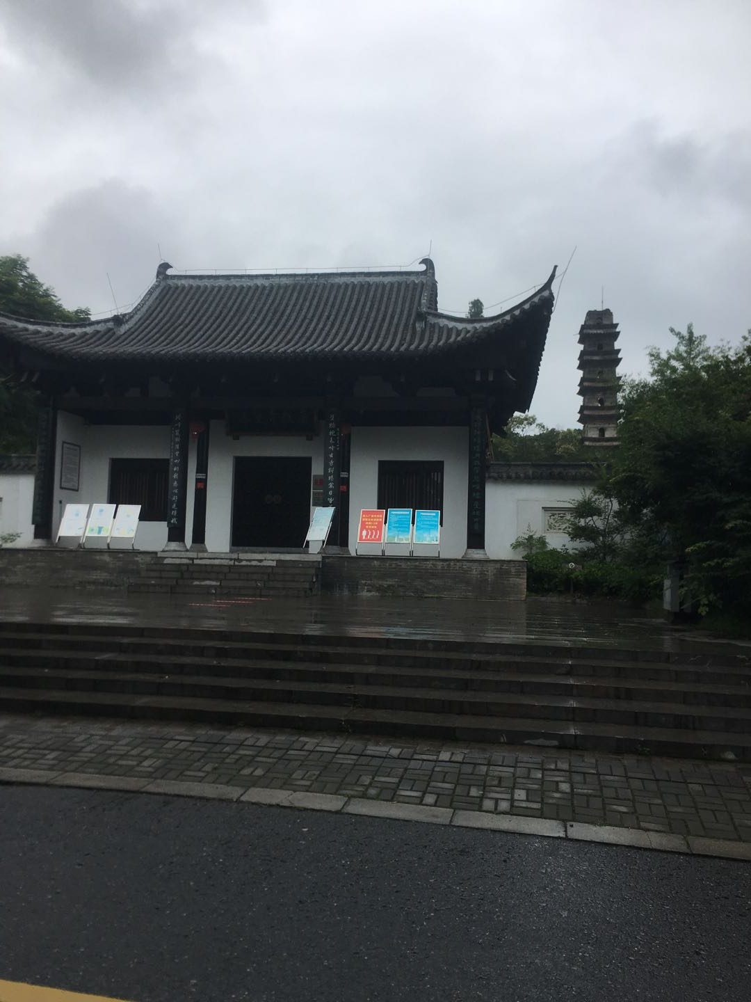 中文（中国大陆）: 广教寺双塔之一